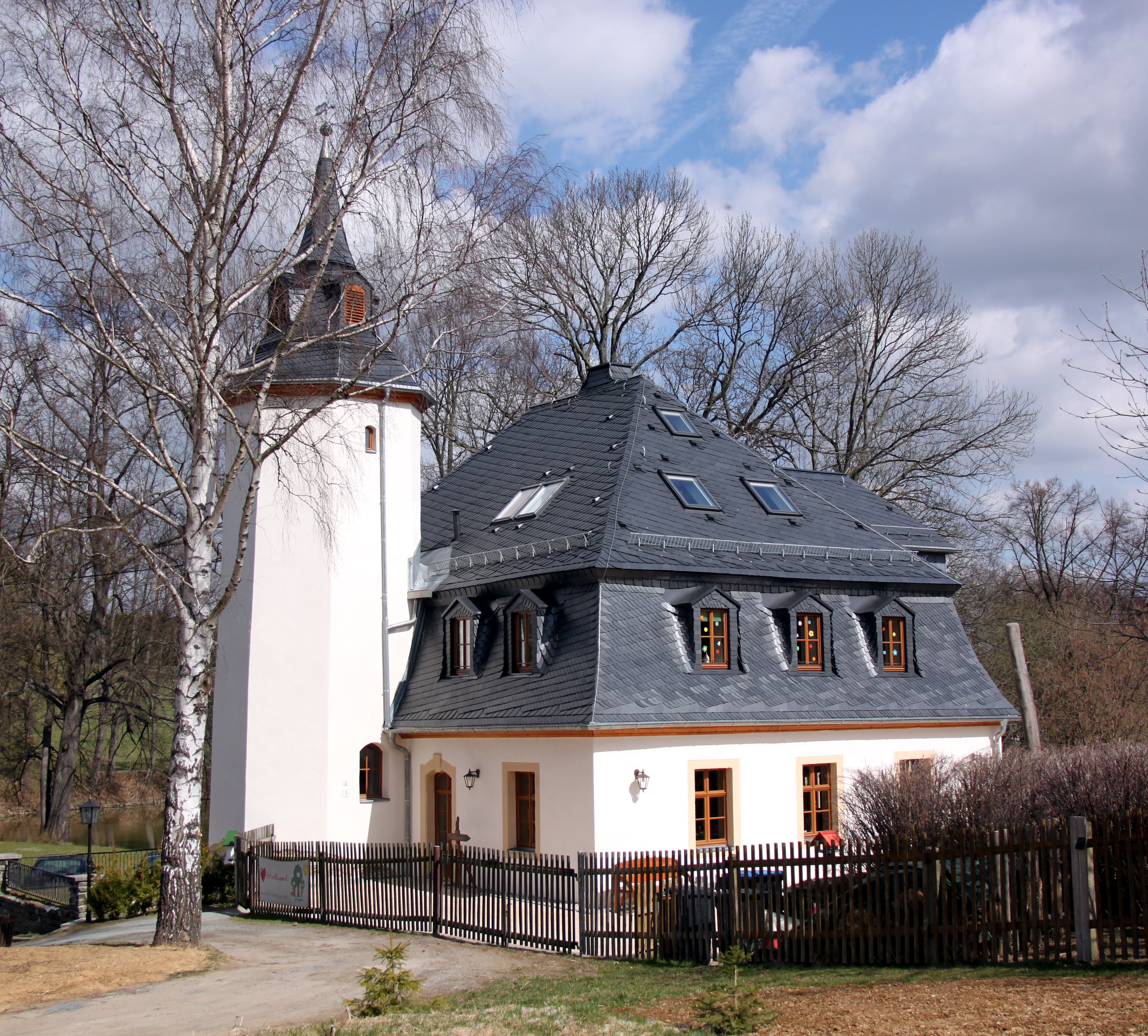 Turmhaus der ehemaligen Ritterguts in Schlößchen